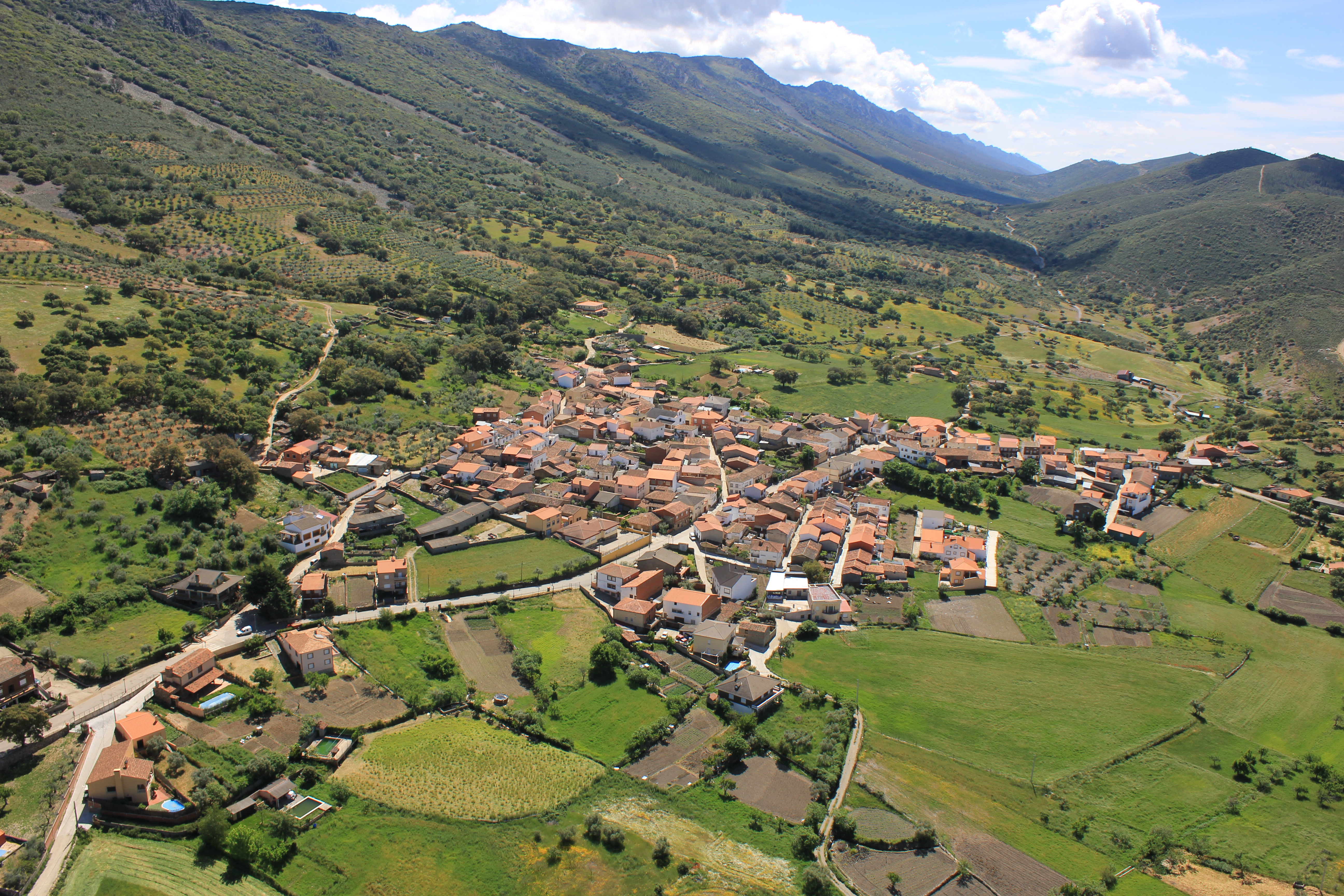 Vista aérea